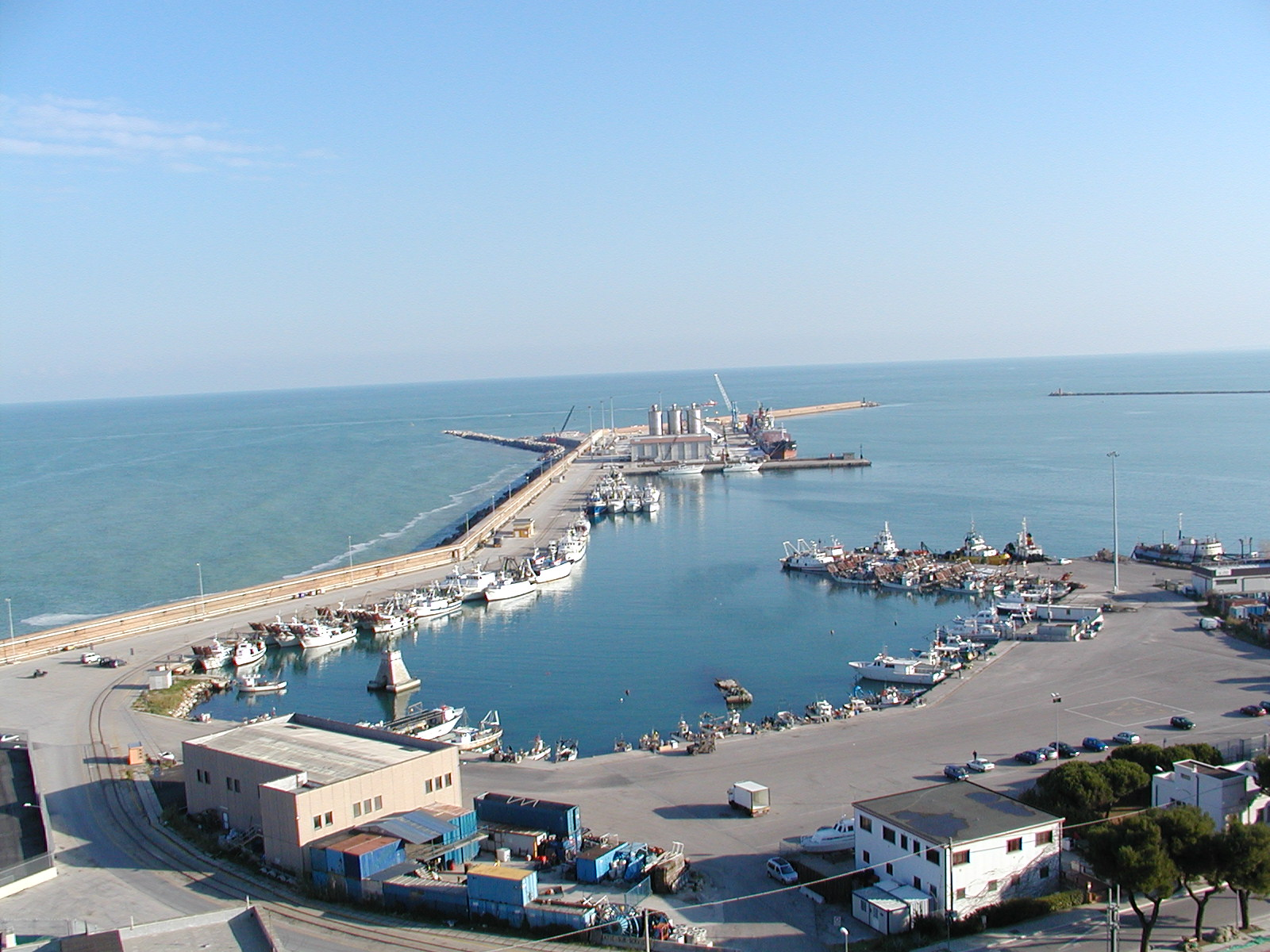 Die Hafen